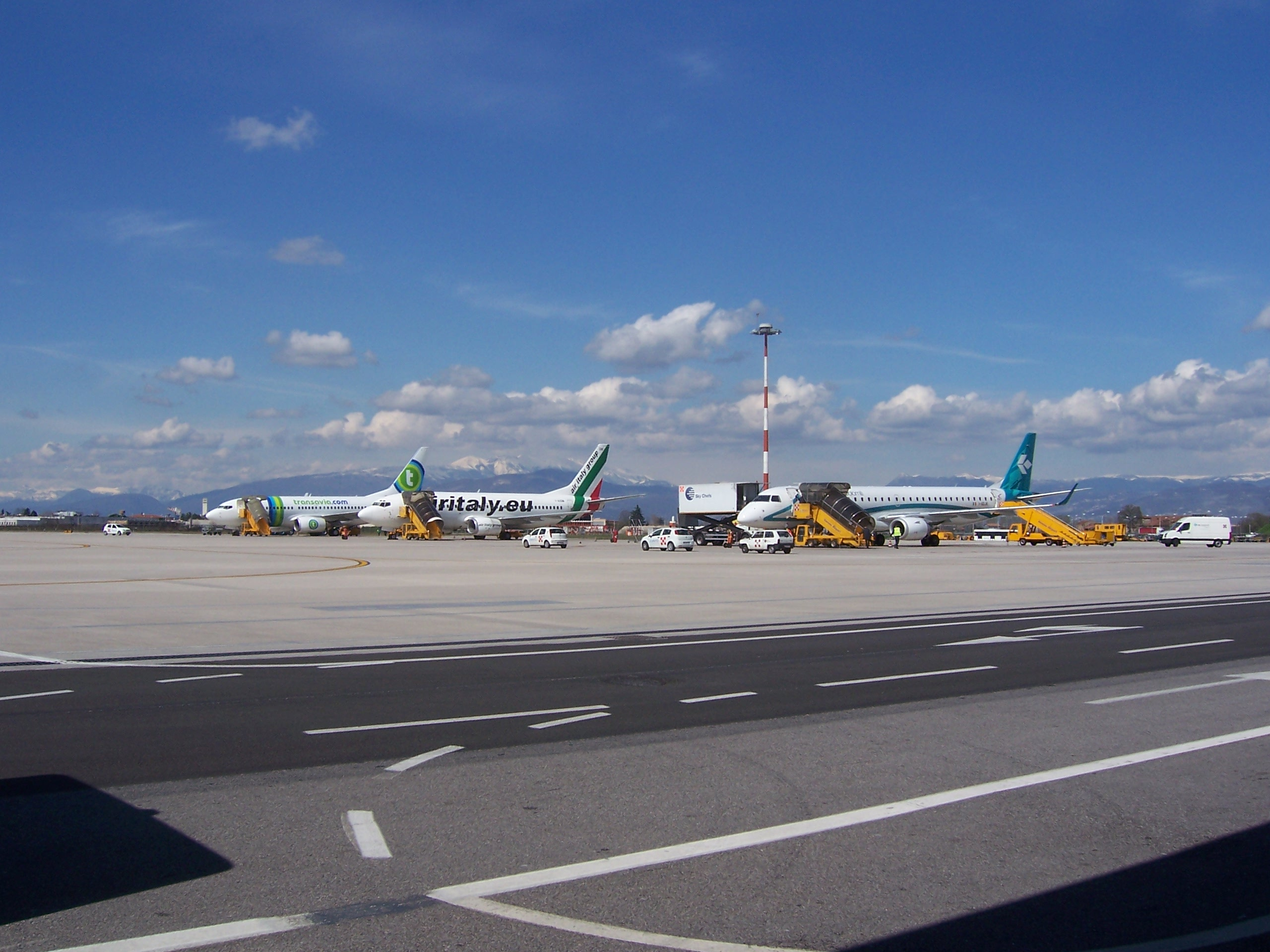 Flugplatz Verona Flugfeld